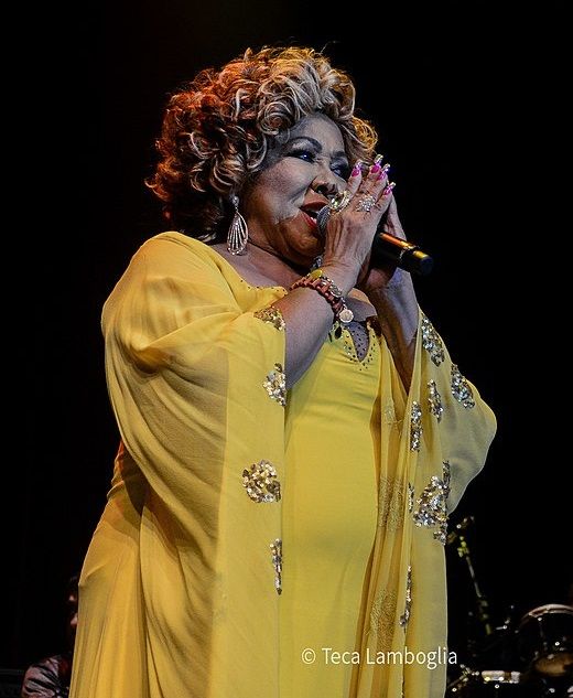 Alcione em 2018